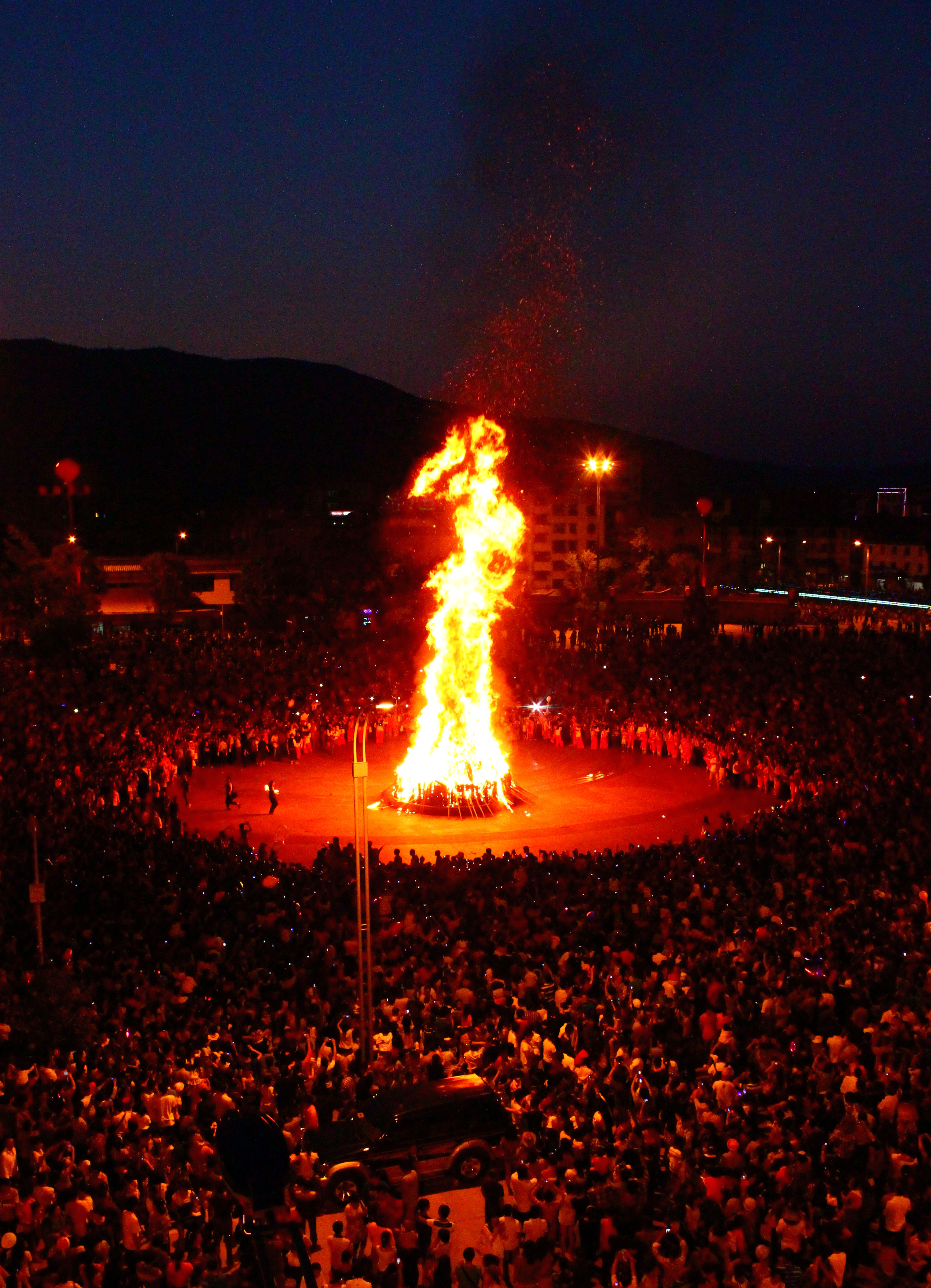 云南省峨山彝族自治县在民族团结广场上庆祝火把节，人们围着篝火。